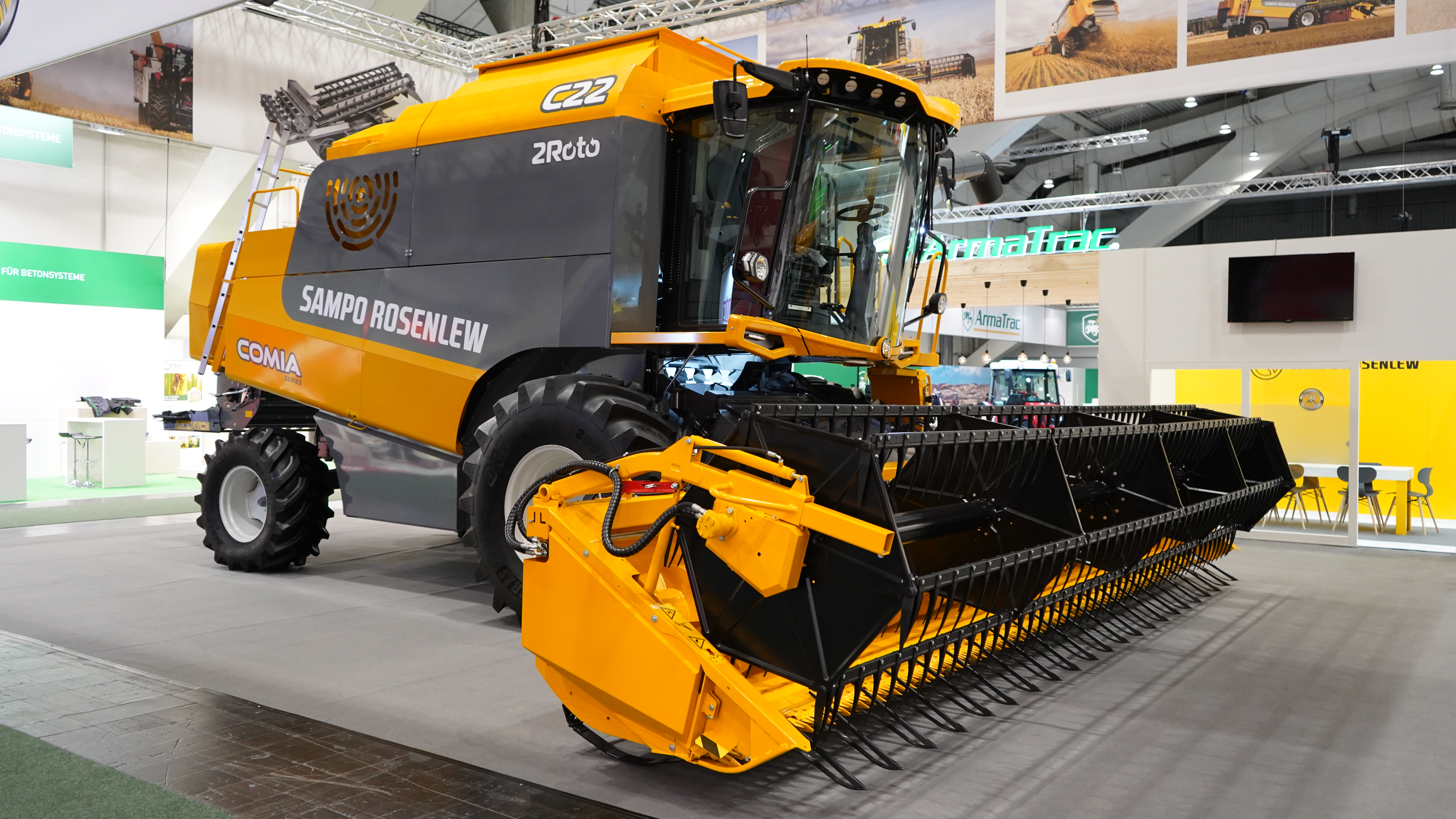 Schrägansicht der Front eines Sampo Rosenlew Comia C22, ausgestellt auf der Agritechnica 2019.